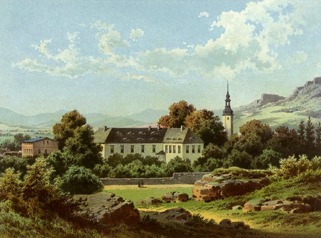 Herrenhaus in Lampersdorf, Kreis Frankenstein